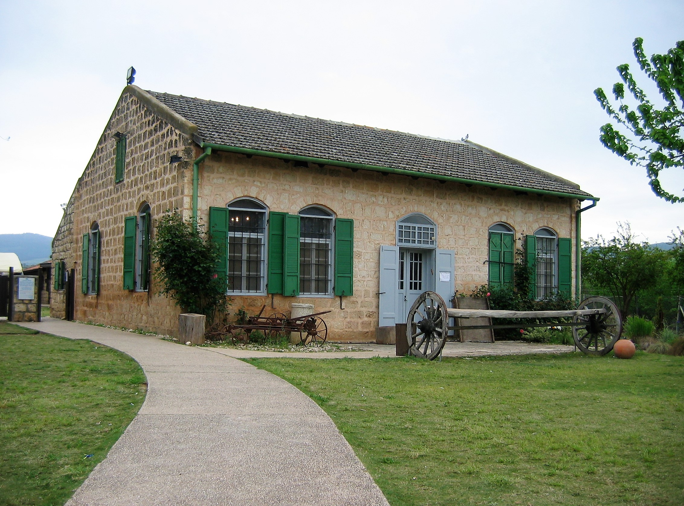 אחוזת דוברובין ביסוד המעלה - מבט אל מבנה המגורים